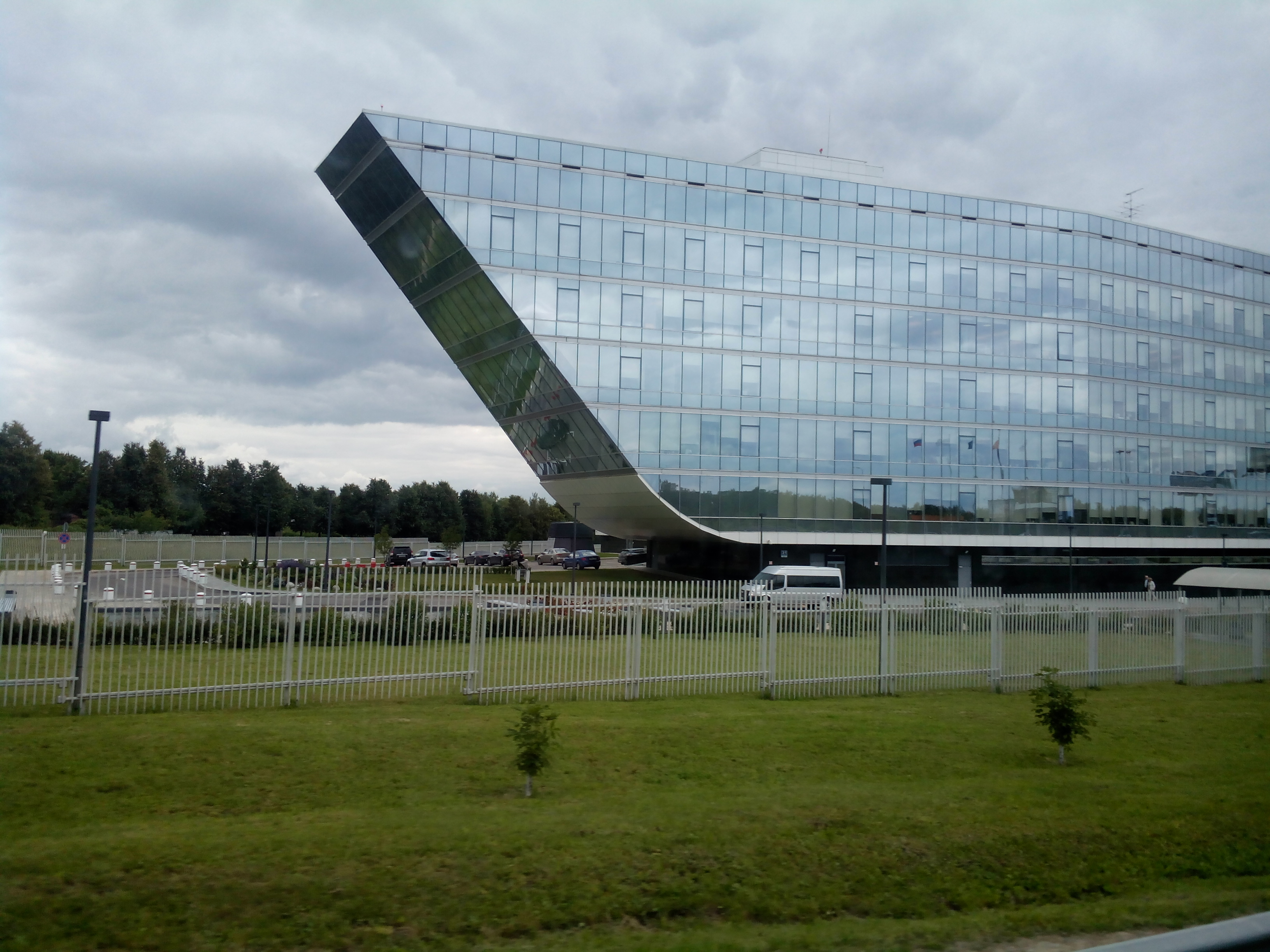 Аэрофлот